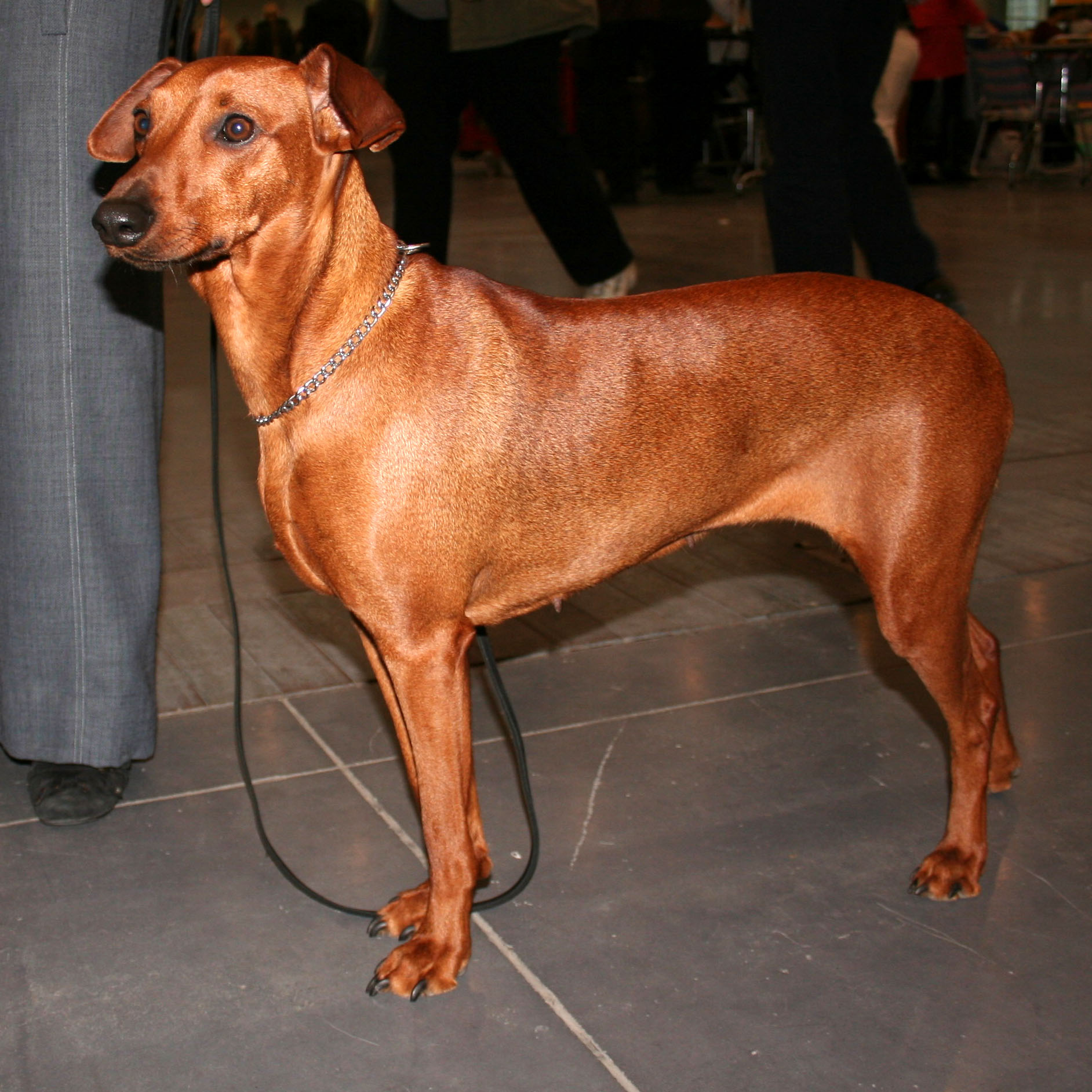 Pinczer_średni na Światowej Wystawie Psów Rasowych w Poznaniu